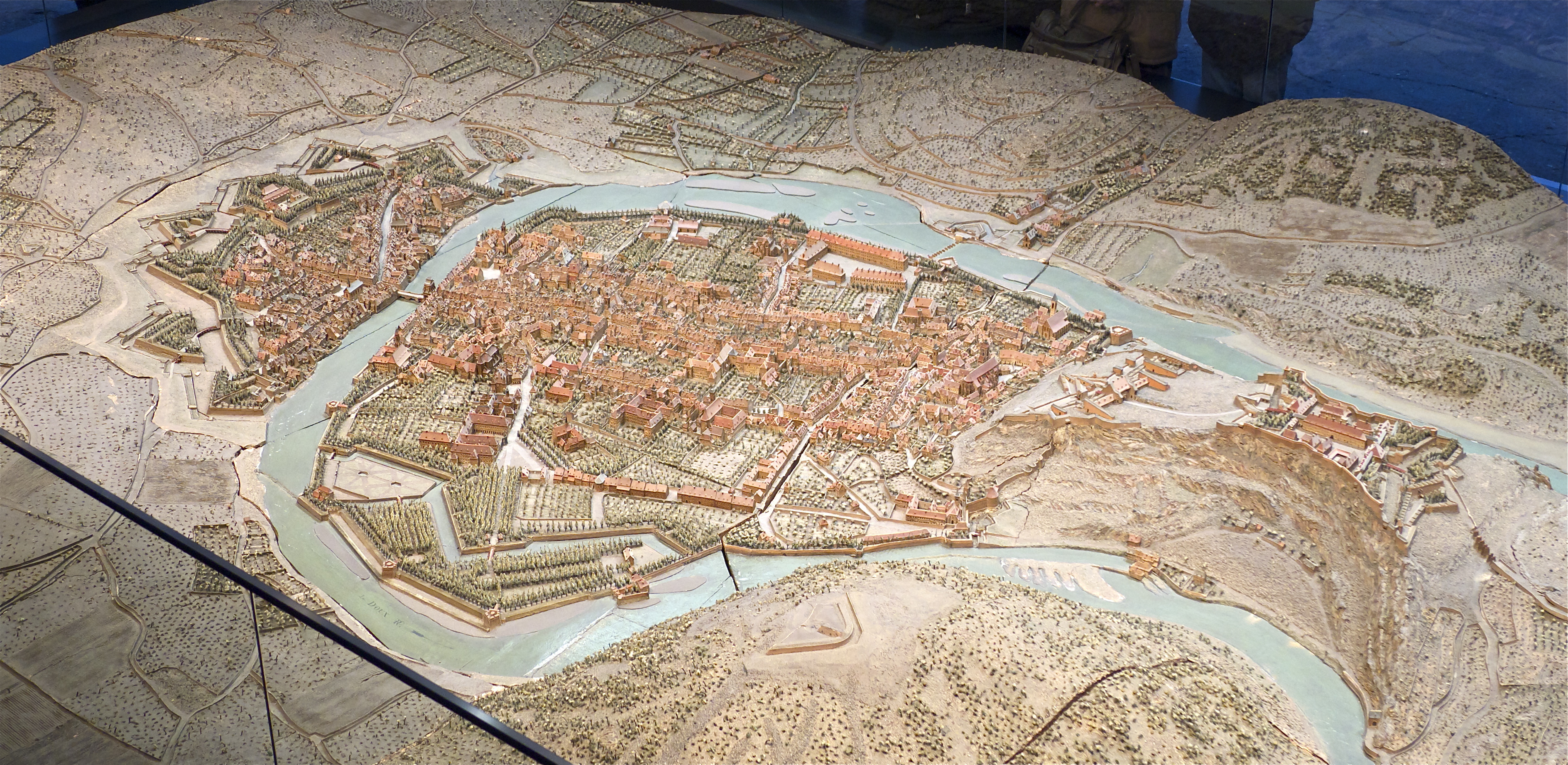 Plan-relief de Besançon en 1722. Plan-relief construit de 1720 à 1722 sous la direction de l'ingénieur Ladevèze. Échelle 1/600e